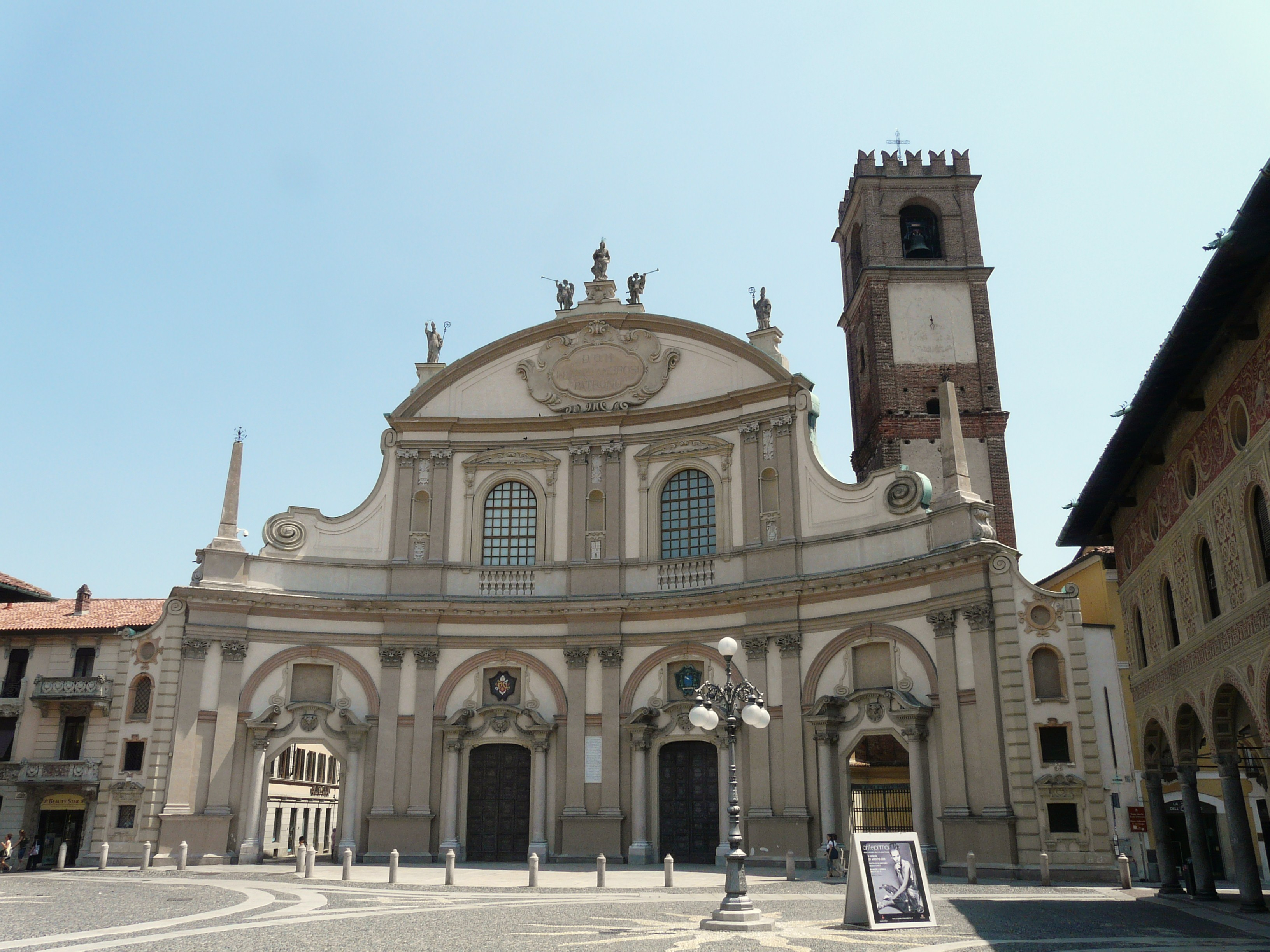 Duomo, Vigevano, Lombardia, Italia